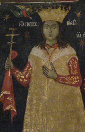 Petru cel Tanar